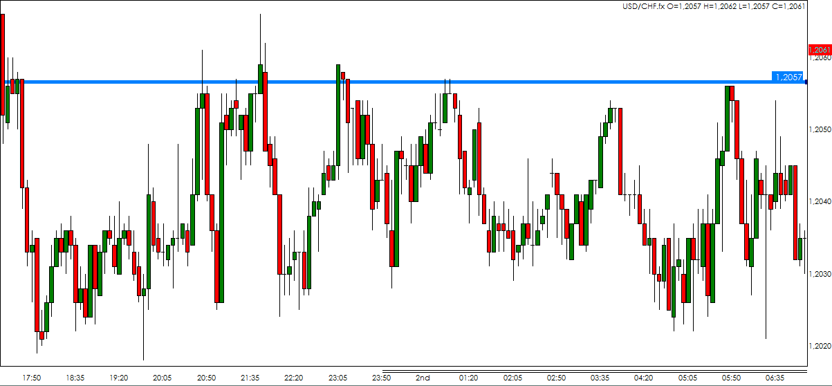 Oblast podpory, cena se opakovaně odráží od úrovně 1,2057